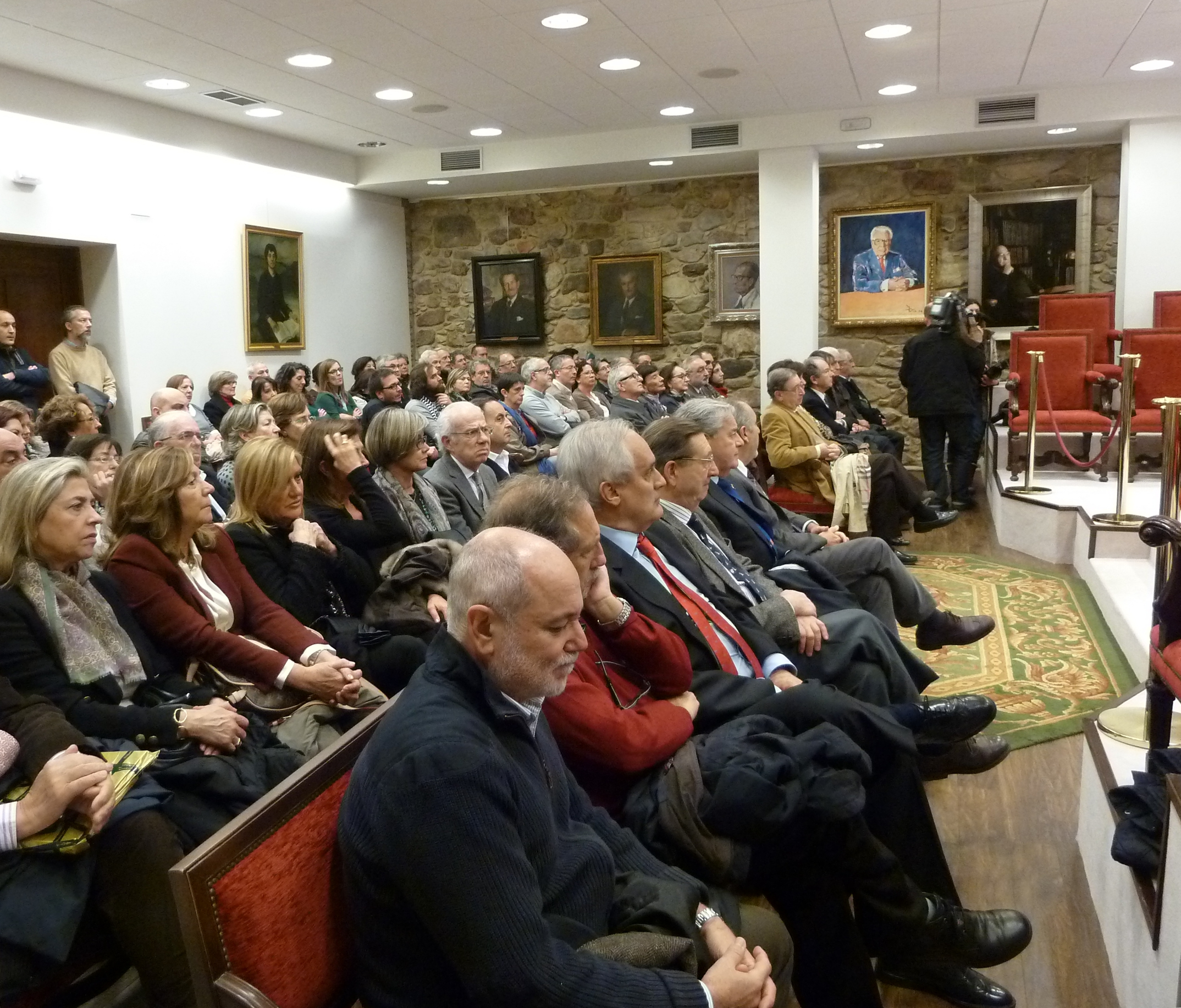 Salón de actos da Real Academia Galega durante a presentación do libro Abecedario das mantenzas de Fausto Galdo en decembro do 2012.